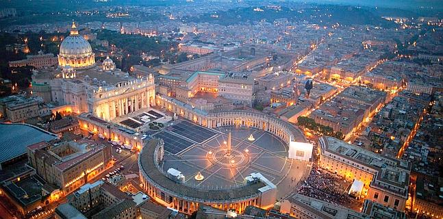 MAS506- ROMA (ITALIA). 30/4/2011.- Vista aérea panorámica de los alrededores de la Plaza de San Pedro en Ciudad del Vaticano hoy, sábado 30 de abril de 2011, en la noche de vigilia previo a la beatificación mañana del papa Juan Pablo II. unas 200.000 personas, según la policía, se reunieron en esa ciudad italiana para conmemorar al papa Wojtyla, al que consideran ya "santo". EFE//MASSIMO SESTINI/CORTESÍA/SOLO USO EDITORIAL/NO VENTAS TELETIPOS_CORREO:REL,REL,%%%,%%%